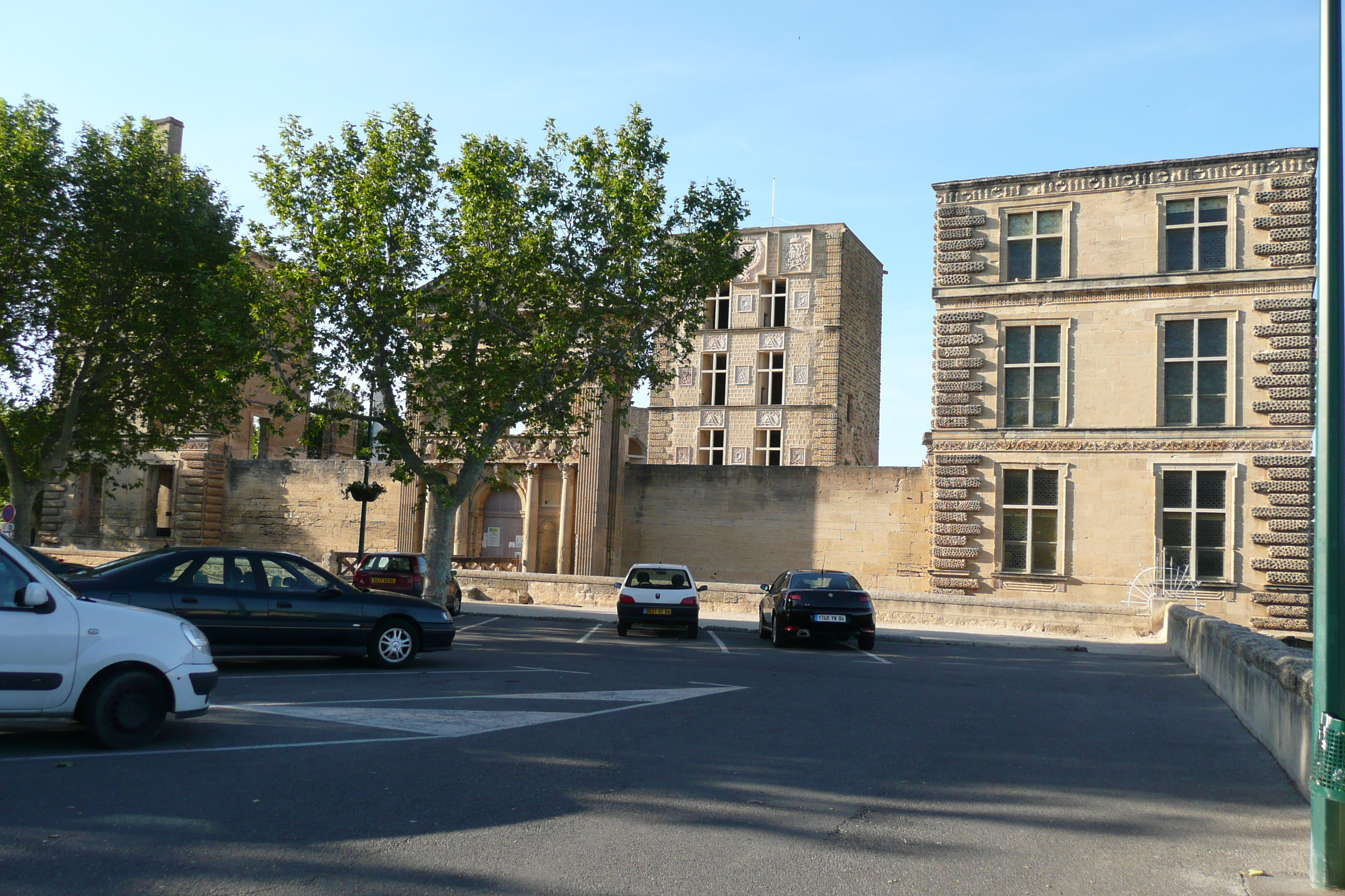 Le château de la ville La Tour-d'Aigues.